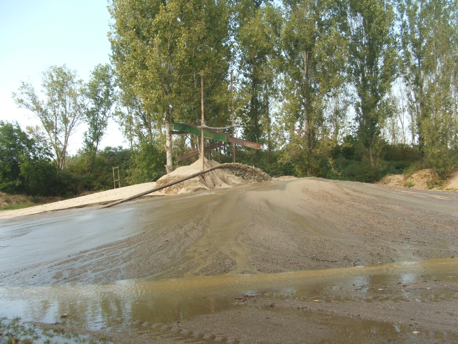 Marosi homok bányászata szivattyúzással (Magyarcsanád, Maros-part)